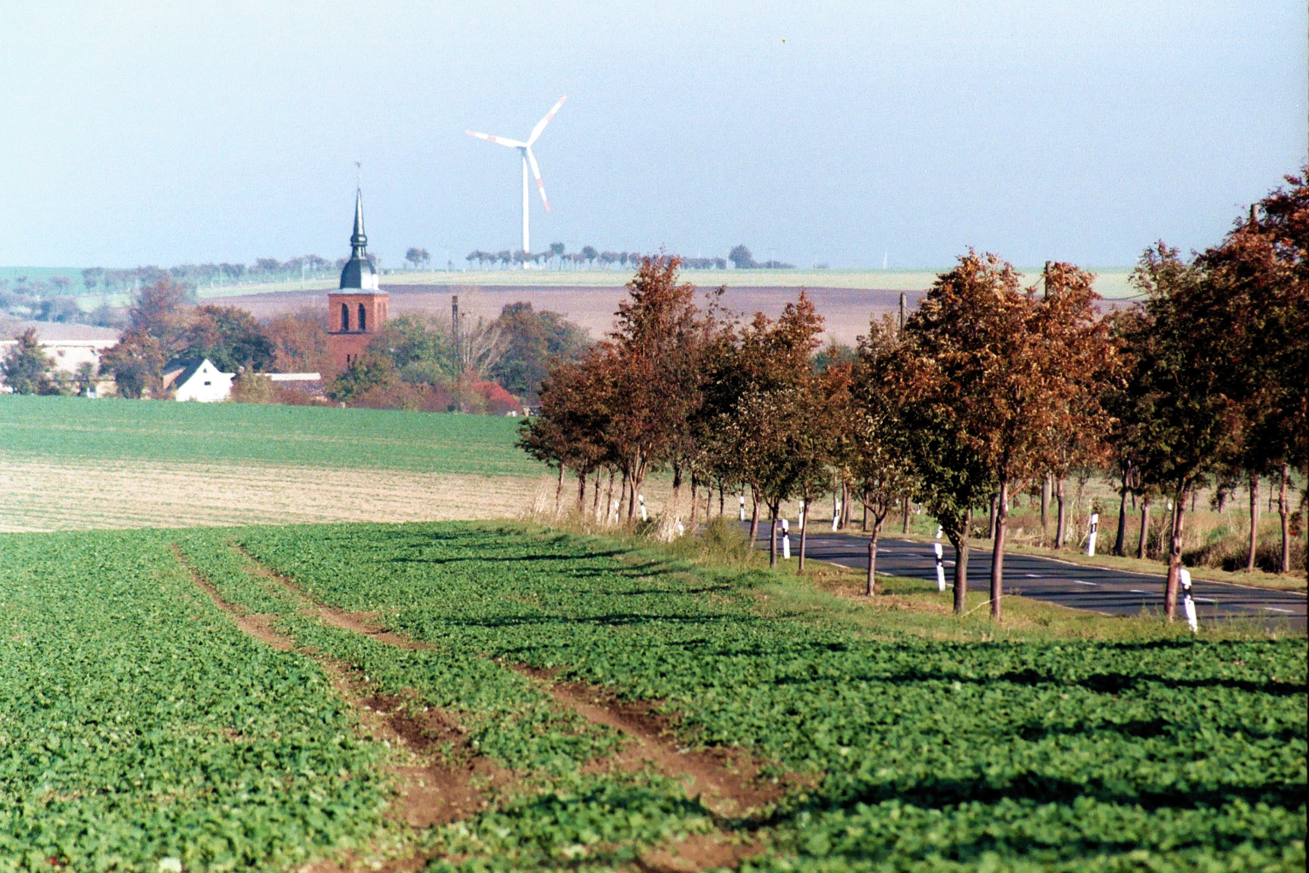 Blick aus Richtung Oberrißdorf nach Hedersleben This is a photograph of an architectural monument. 65468